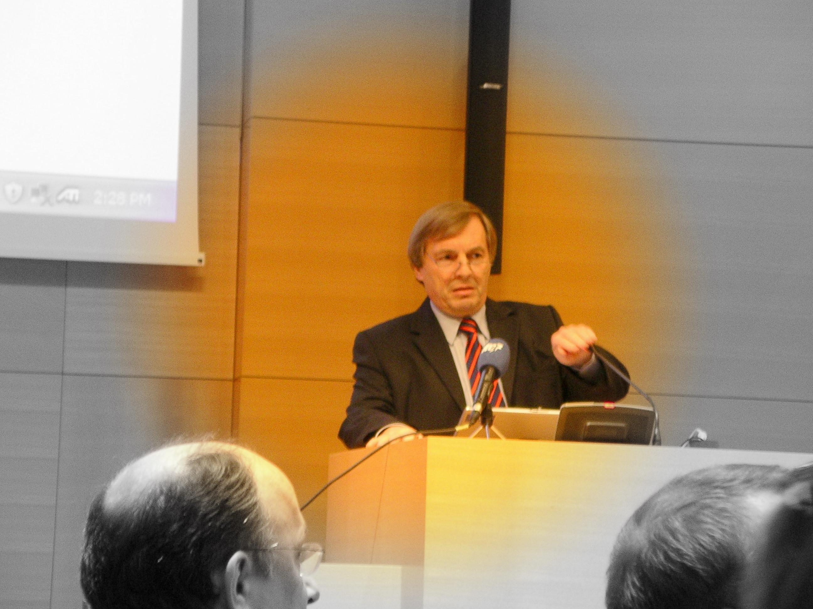 Minister Jeannot Krecké, Ansprache auf Konferenz über Urheberrecht in Luxemburg, Chambre de Commerce, Kirchberg